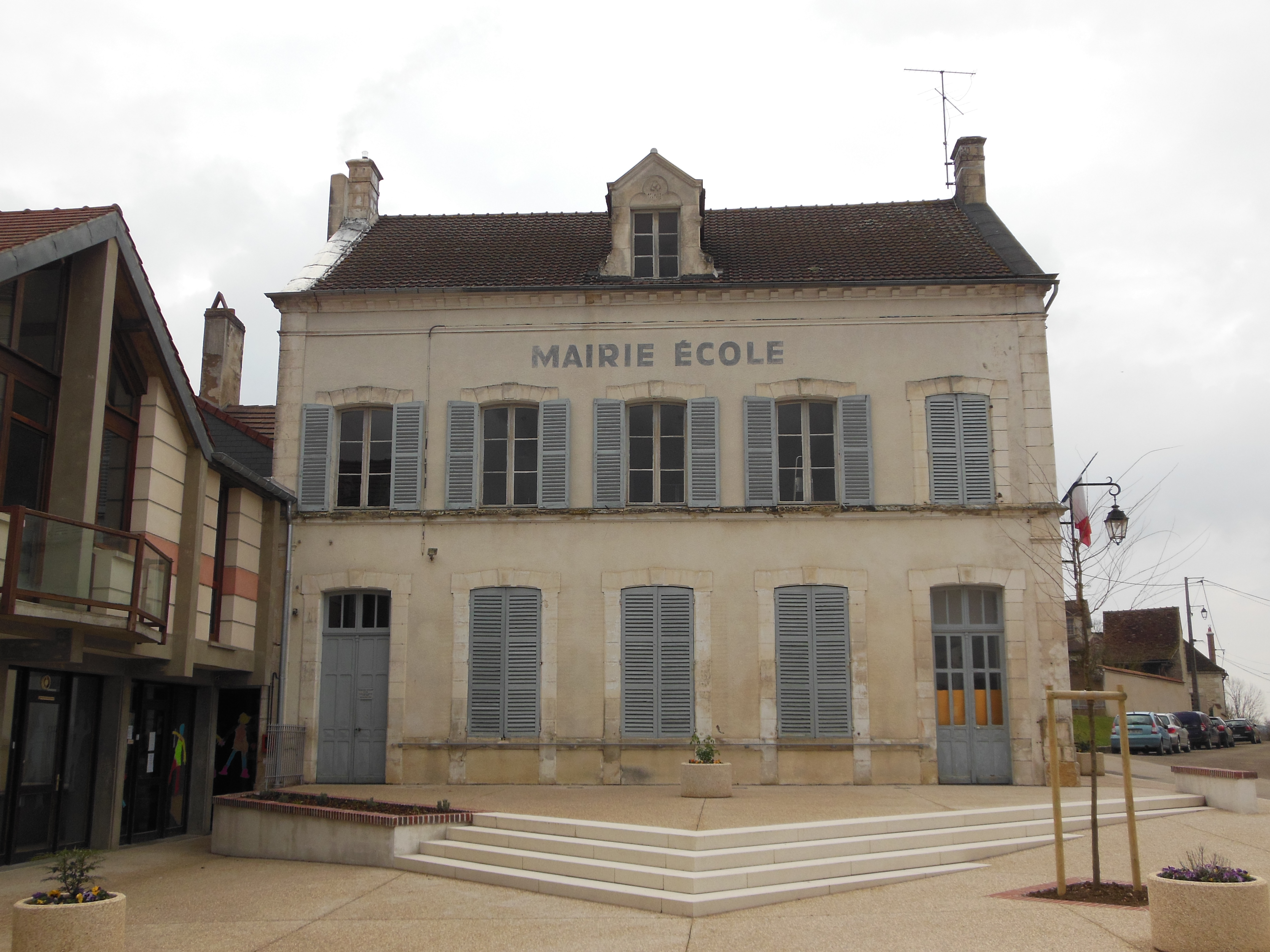 Mairie-école d'Escolives, Yonne, Bourgogne, France.